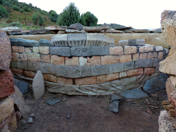 S'Arcu e is Forros